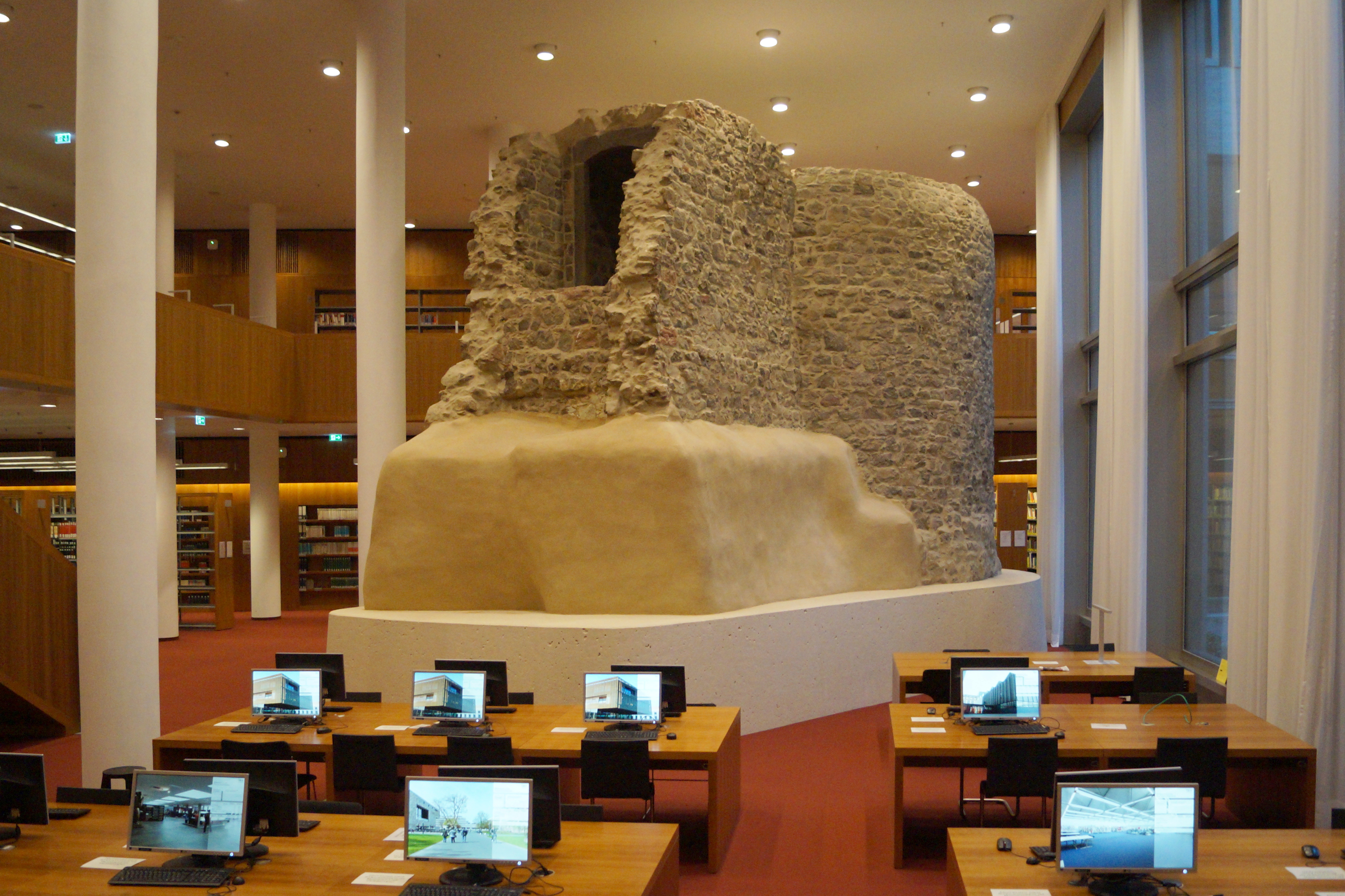 Konservierter Eiskeller "Affenstein" in der gesellschafts- und erziehungswissenschaftlichen Bibliothek auf dem Frankfurter Uni-Campus Westend.